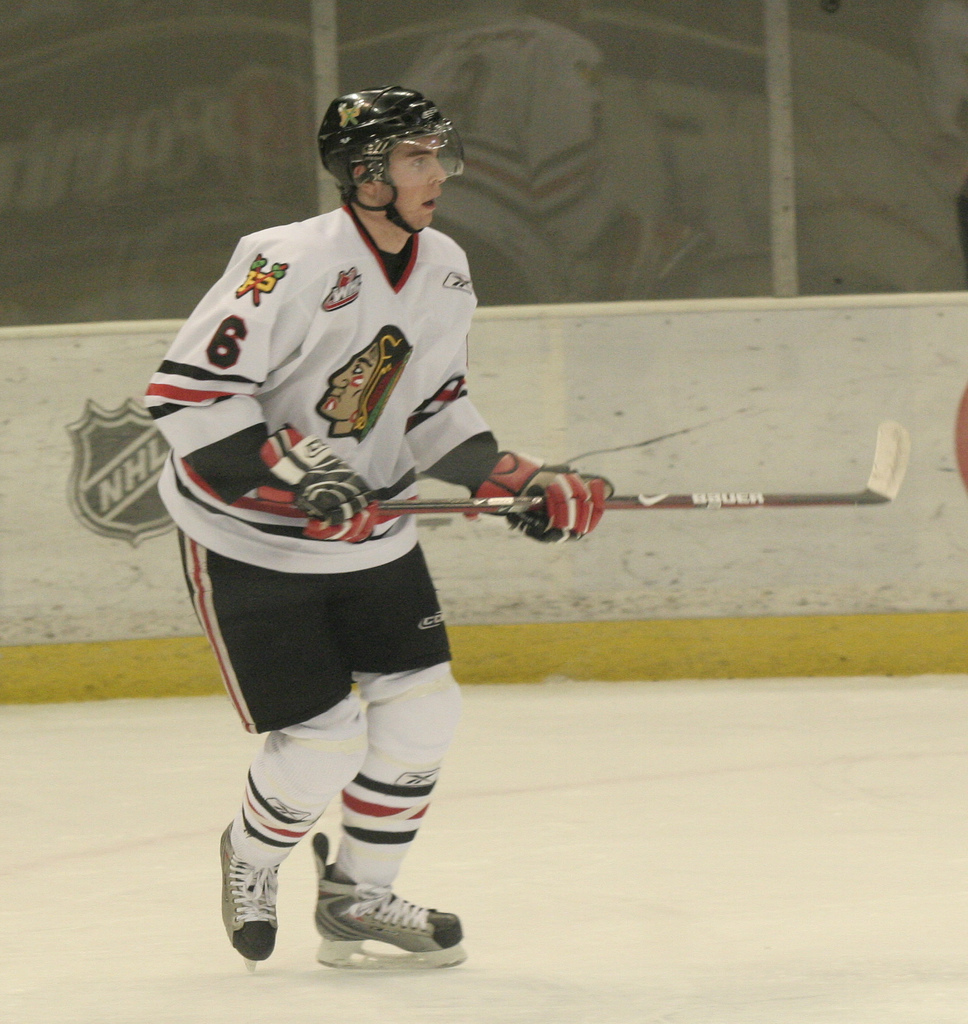 Brett Ponich, #6 Portland Winter Hawks